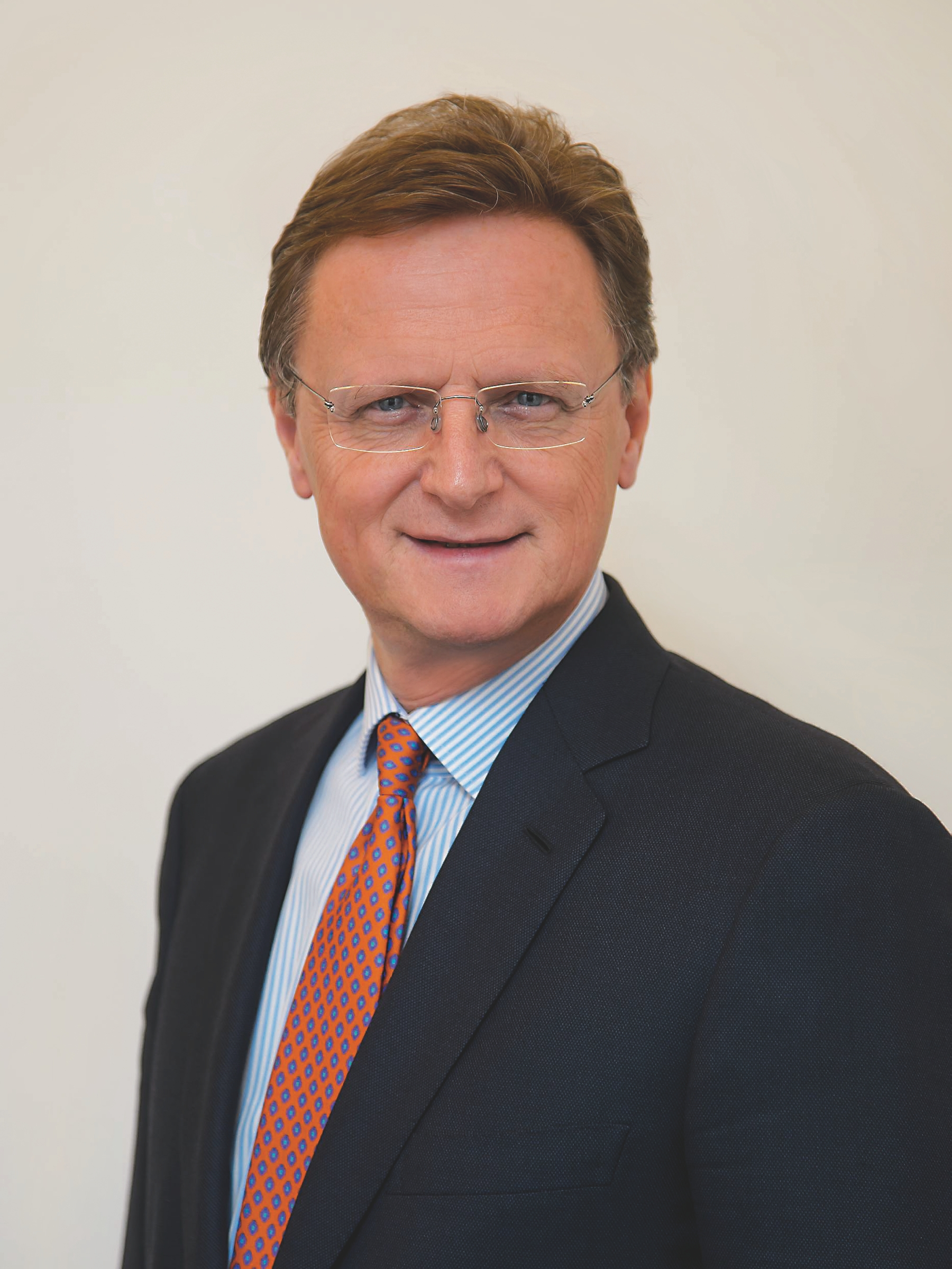 Hermann Gmeiner-Wagner, Inhaber von Wagner, Enkel des Firmengründers Paul Wagner